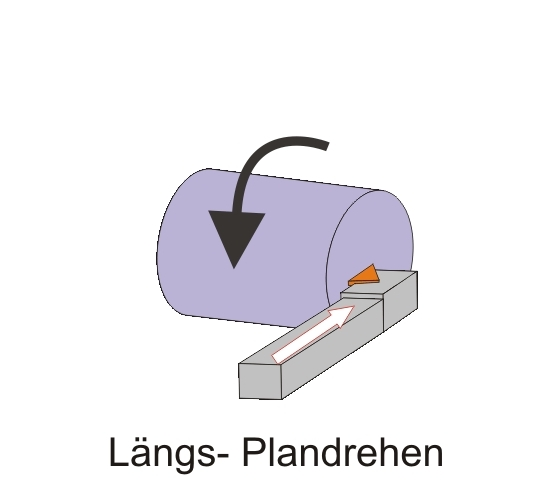 Längsplandrehen